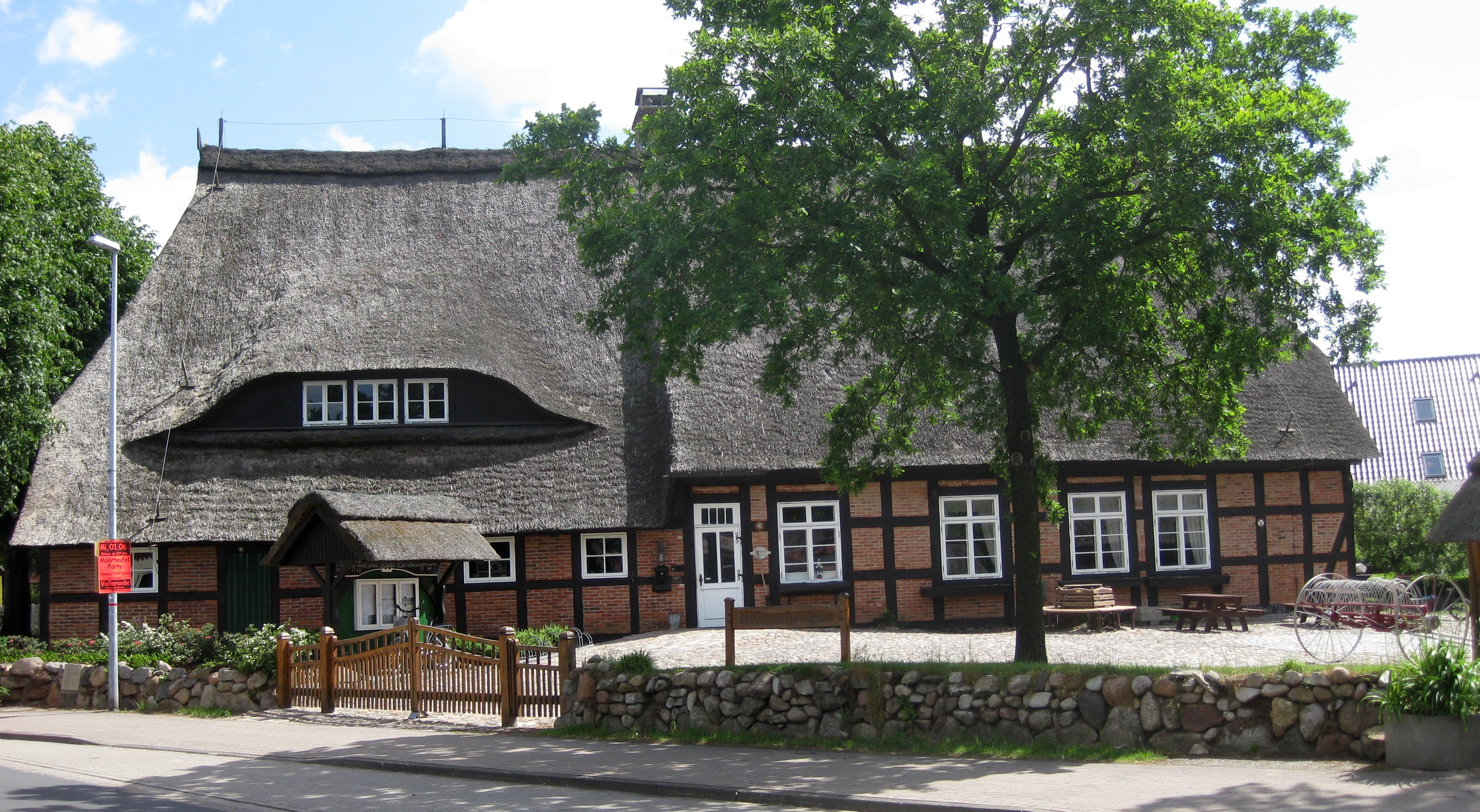 Heimathaus in Bramstedt (von Südwest gesehen)